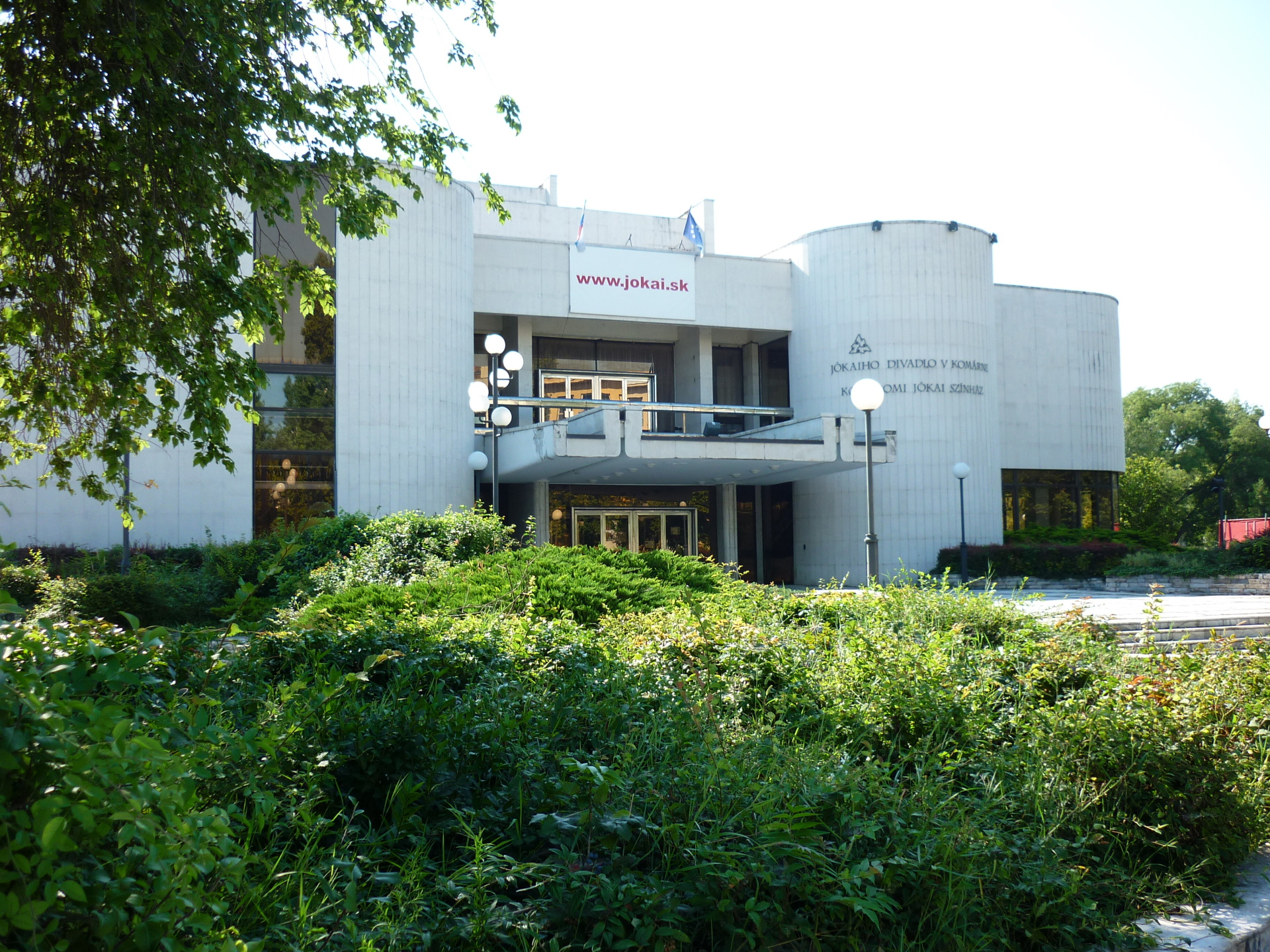 Komárno - Jókaiho divadlo